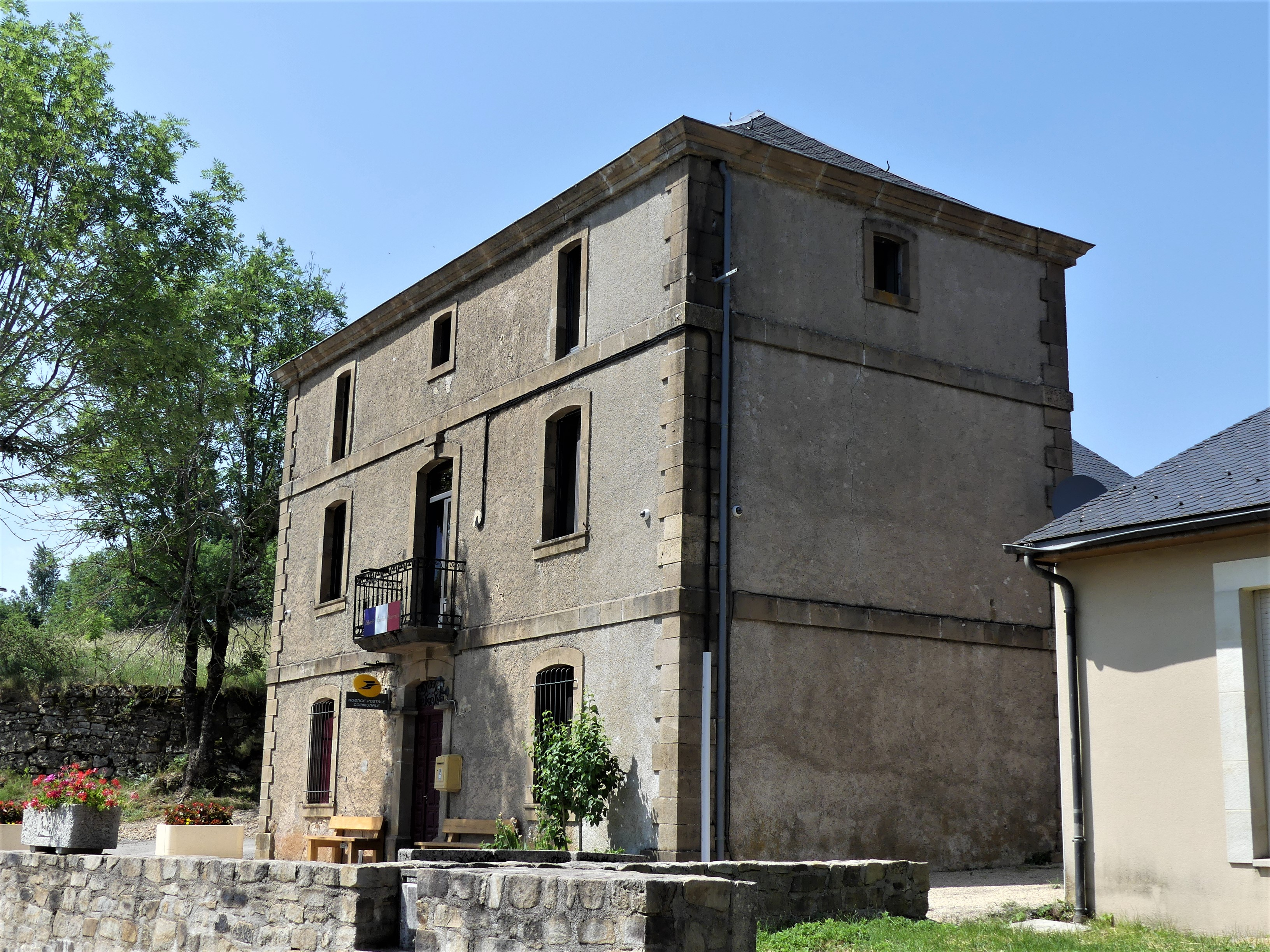 La mairie au bourg de Camprieu, Saint-Sauveur-Camprieu, Gard, France.